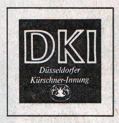 Zeichen der Düsseldorfer Kürschner-Innung, ca. seit den 1970er Jahren, „Jeder Kürschnermeister mit dem DKI-Zeichen hat sich zur Qualität verpflichtet“.